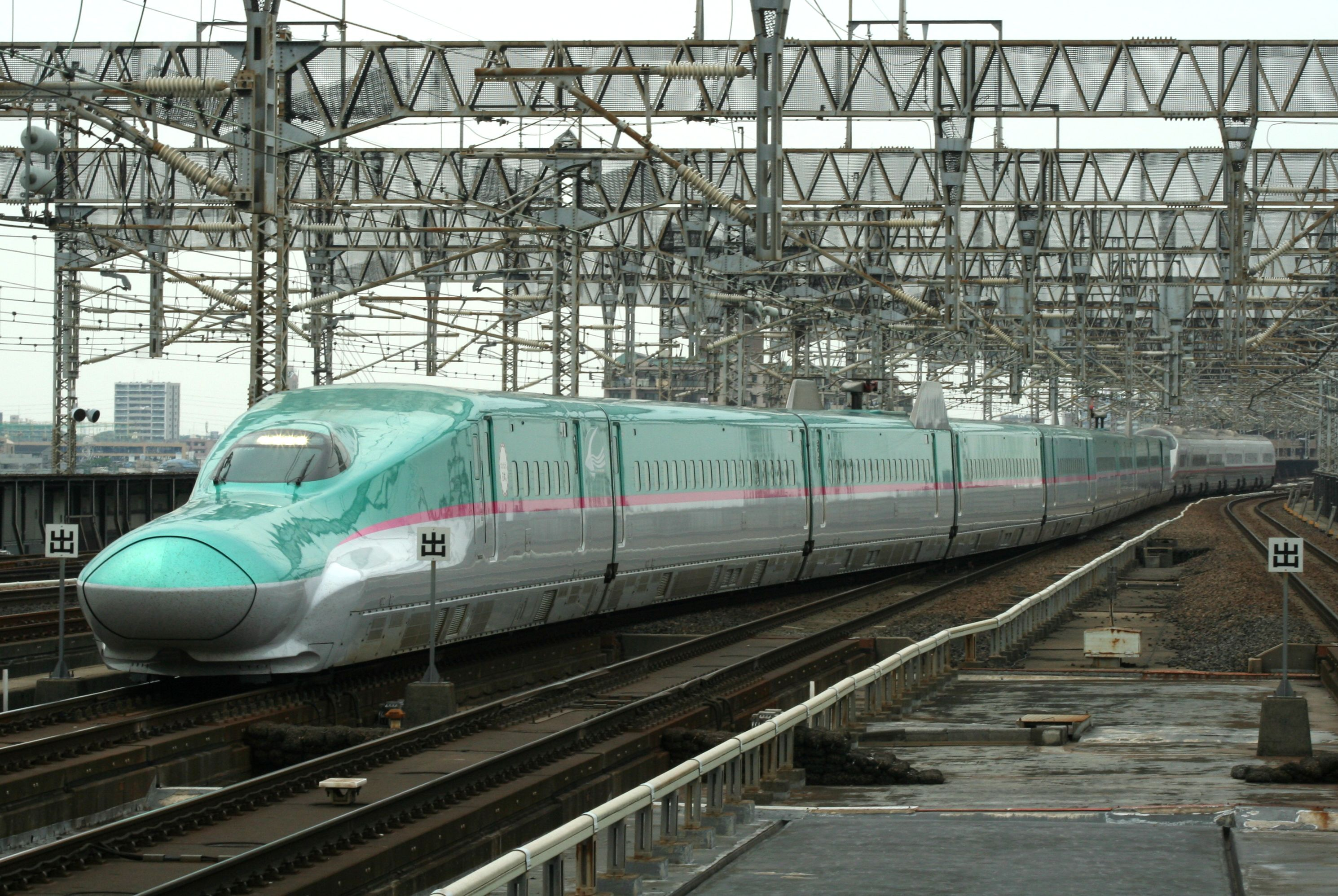 新幹線E5系・E3系（秋田新幹線用）